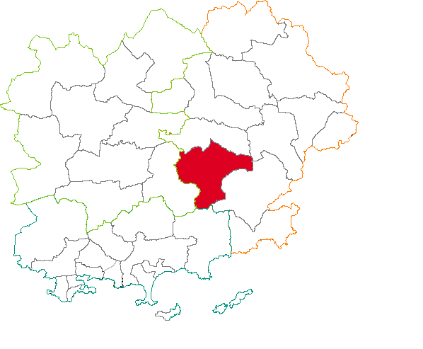 Situation du canton dans le département du Var (83), France